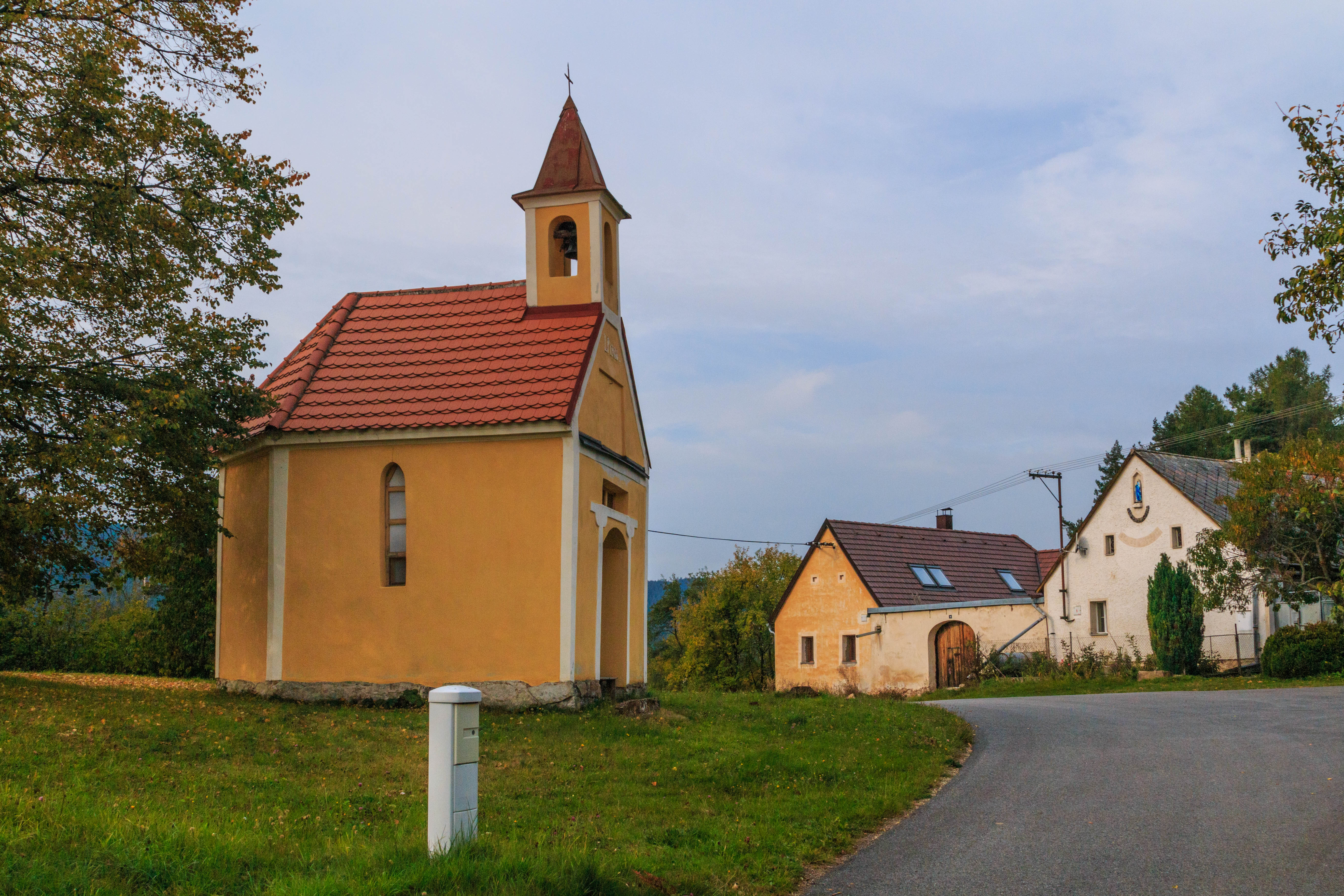 Doubrava u Vlachova Březí - kaple